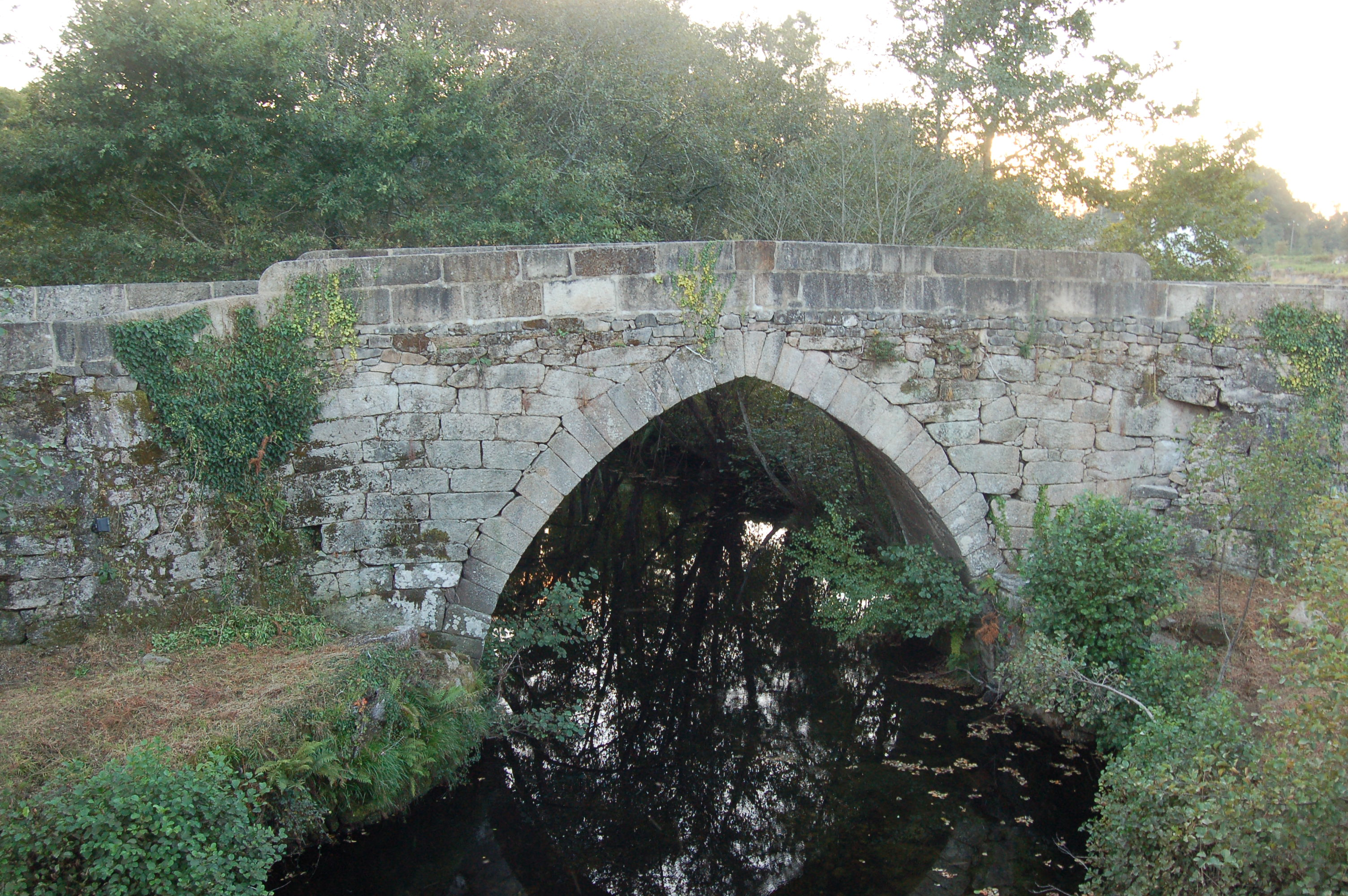 Ponte medieval (S. XV) sobre o río Almofrei en Borela (Cotobade), de arco oxival